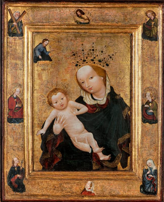 Madona Svatotomášská, revers Veraikon (1420-1440), malba temperou na lipovém dřevě, 638 x 514 mm, Moravská galerie v Brně, Inv. č. A 1721